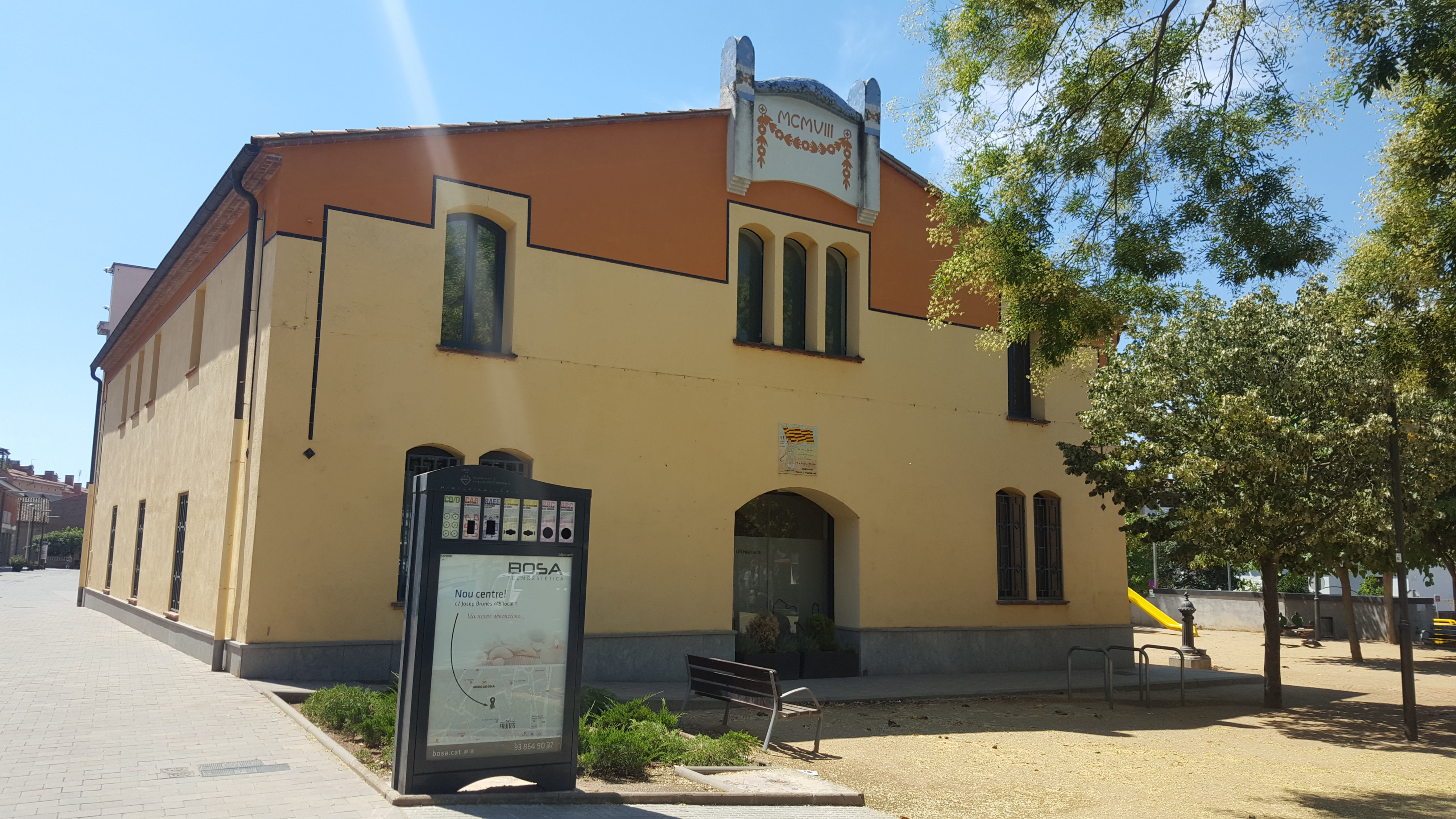 Façana posterior de l'Ajuntament de PsiP